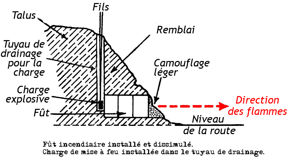 Traduction de Safety fougasse installation.jpg